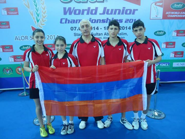 Մալազիա Lilit Poghosyan, Knarik Margaryan, Hrachya Poghosyan, Zaven Mnatsakanyan, Edgar Nazaretyan